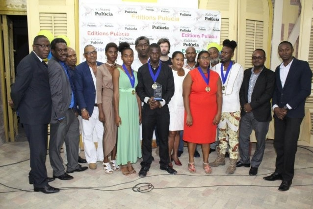 Remise du Prix de la nouvelle littéraire Gary Victor 2017 à Jacmel Haiti par les Editions Pulucia.